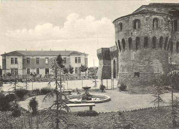 fotografia raffigurante le scuole e la Rocca di Bagnara di Romagna (anni '50)